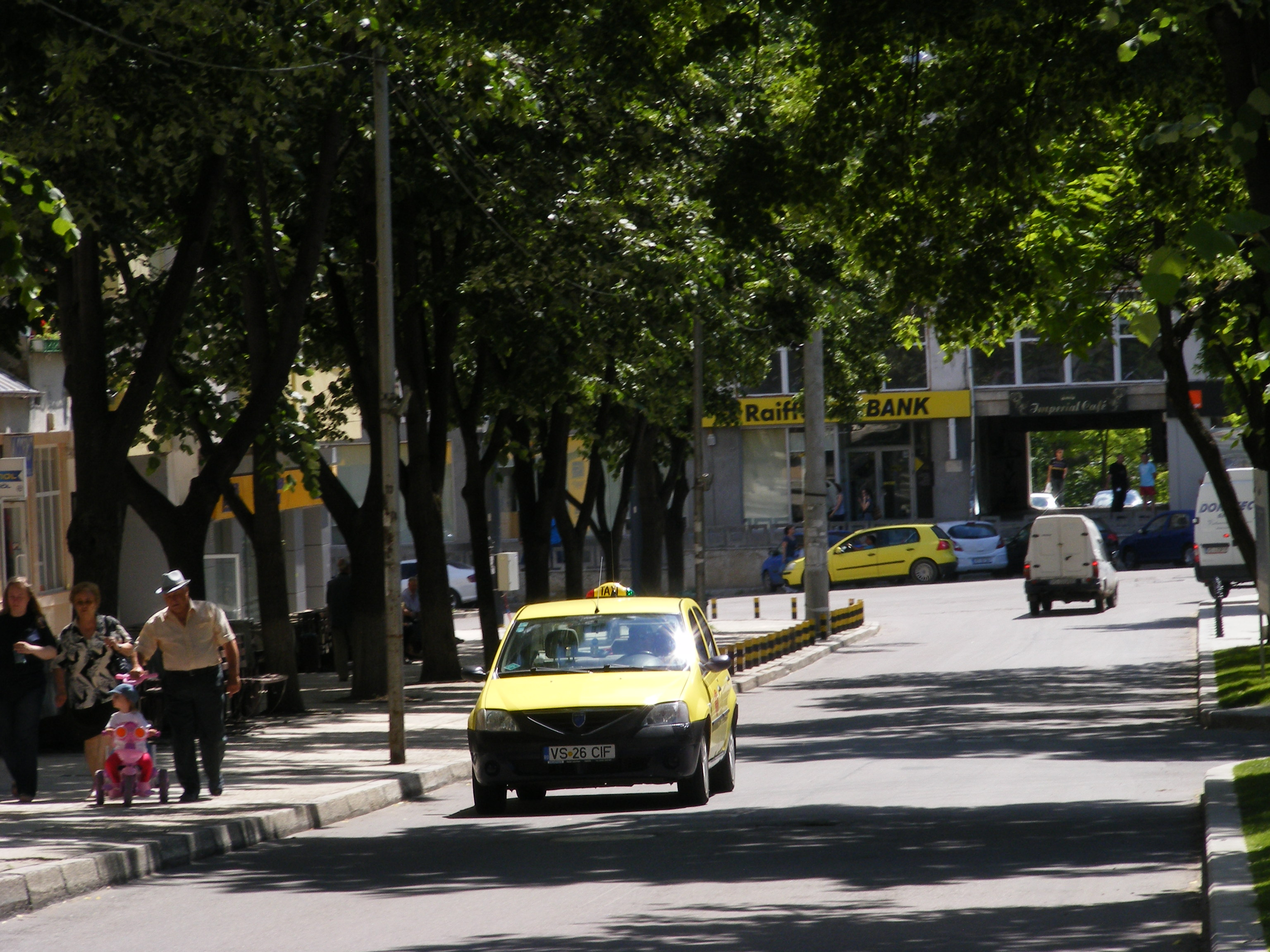 centru vaslui